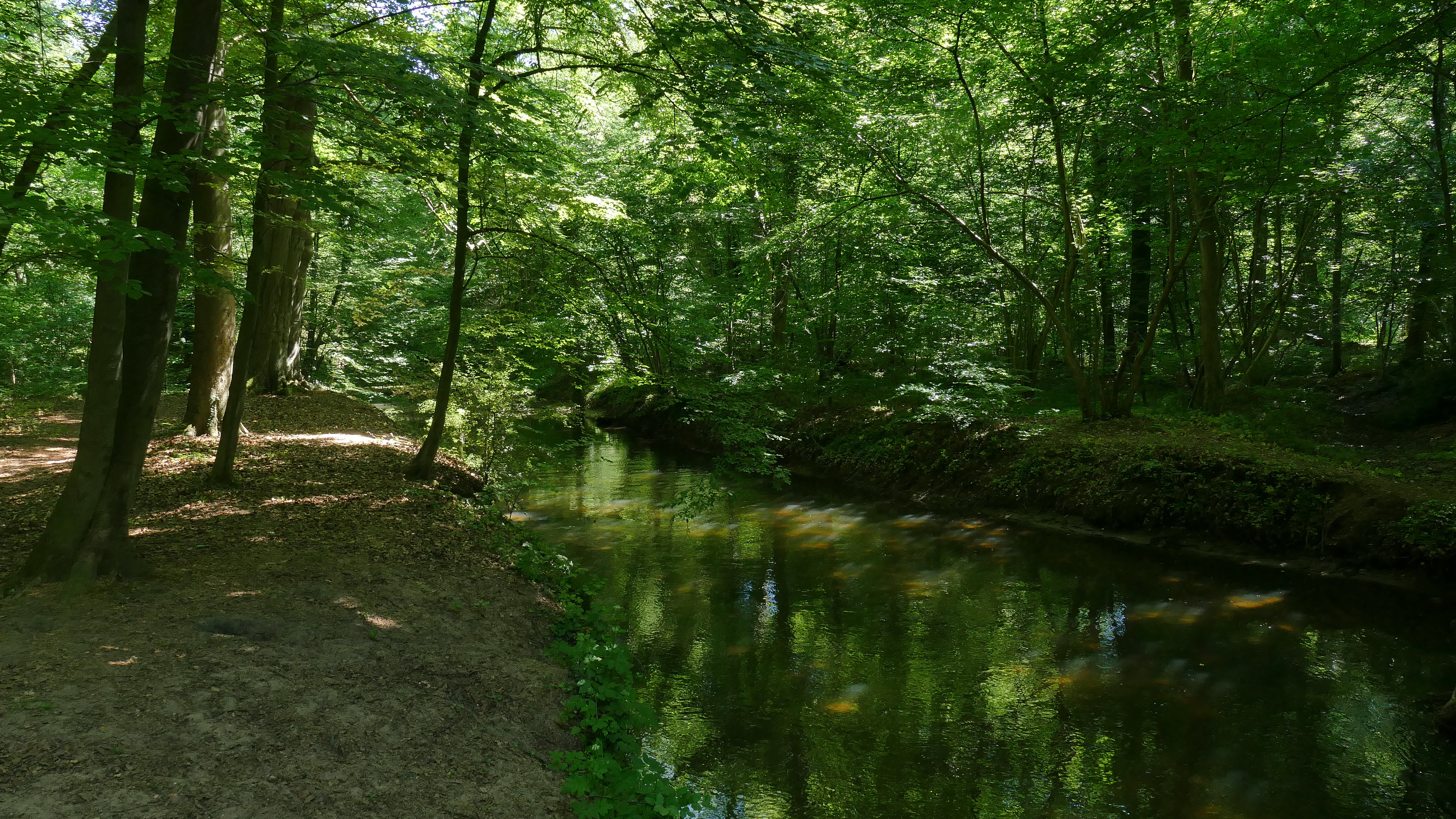 Das Foto zeigt einen naturnahen Flussabschnitt der Fuhse (Nebenfluss der Aller) im FFH-Gebiet 3526-331 „Fuhse-Auwald bei Uetze (Herrschaft)“.